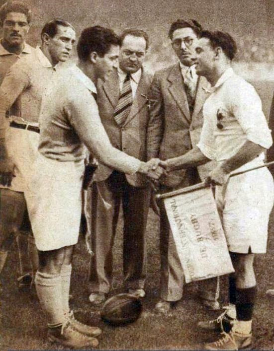 Joseph Desclaux, capitaine de l'équipe de France en 1937, serre la main de celui d'Italie